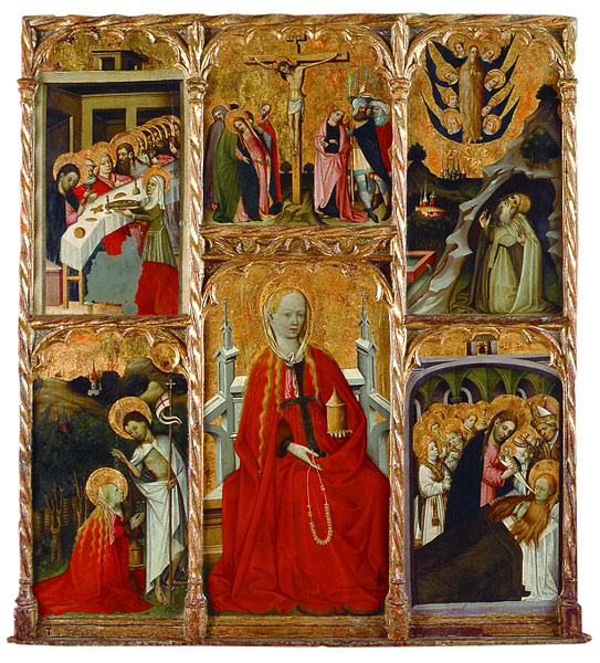 Bernat Martorell Retablo de santa María Magdalena de Perella Barcelona 1437 - 1452 Pintura al temple sobre madera 140 x 130 cm Procedente de la iglesia de Santa Magdalena de Perella, Sant Joan de les Abadesses (Ripollès) Al Museu Episcopal de VIc